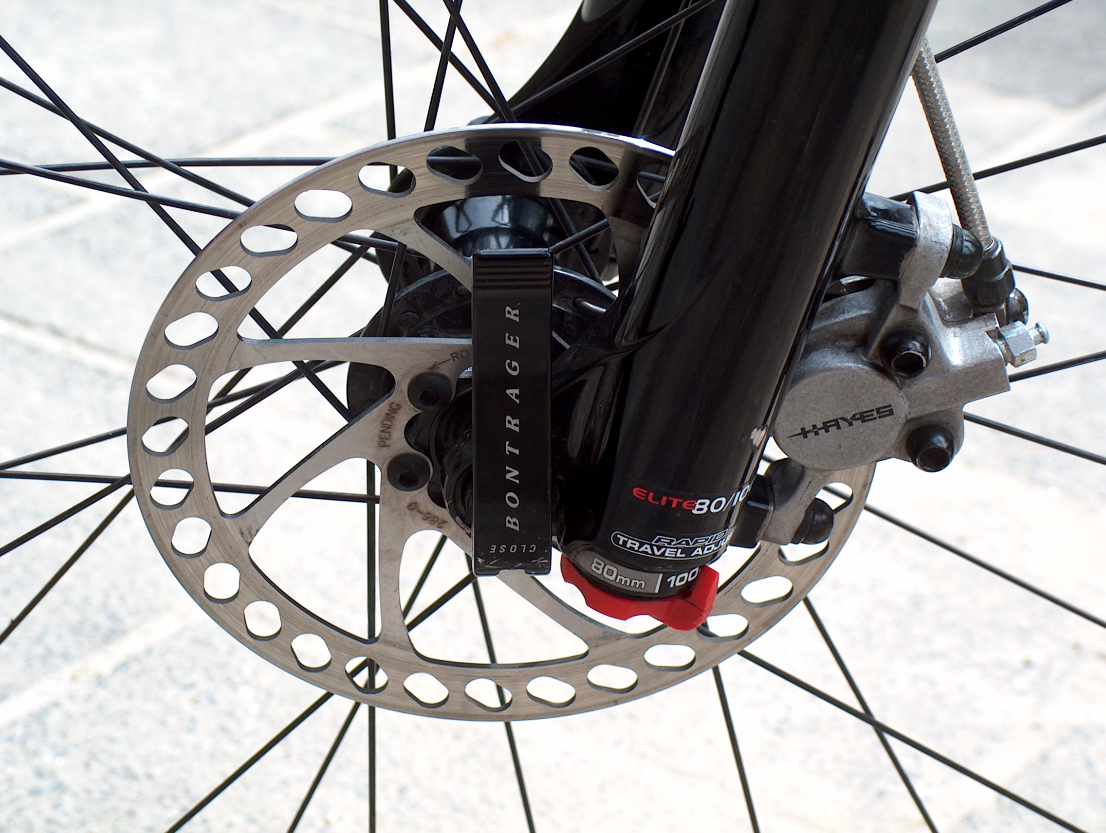 Hayes Disc Brake